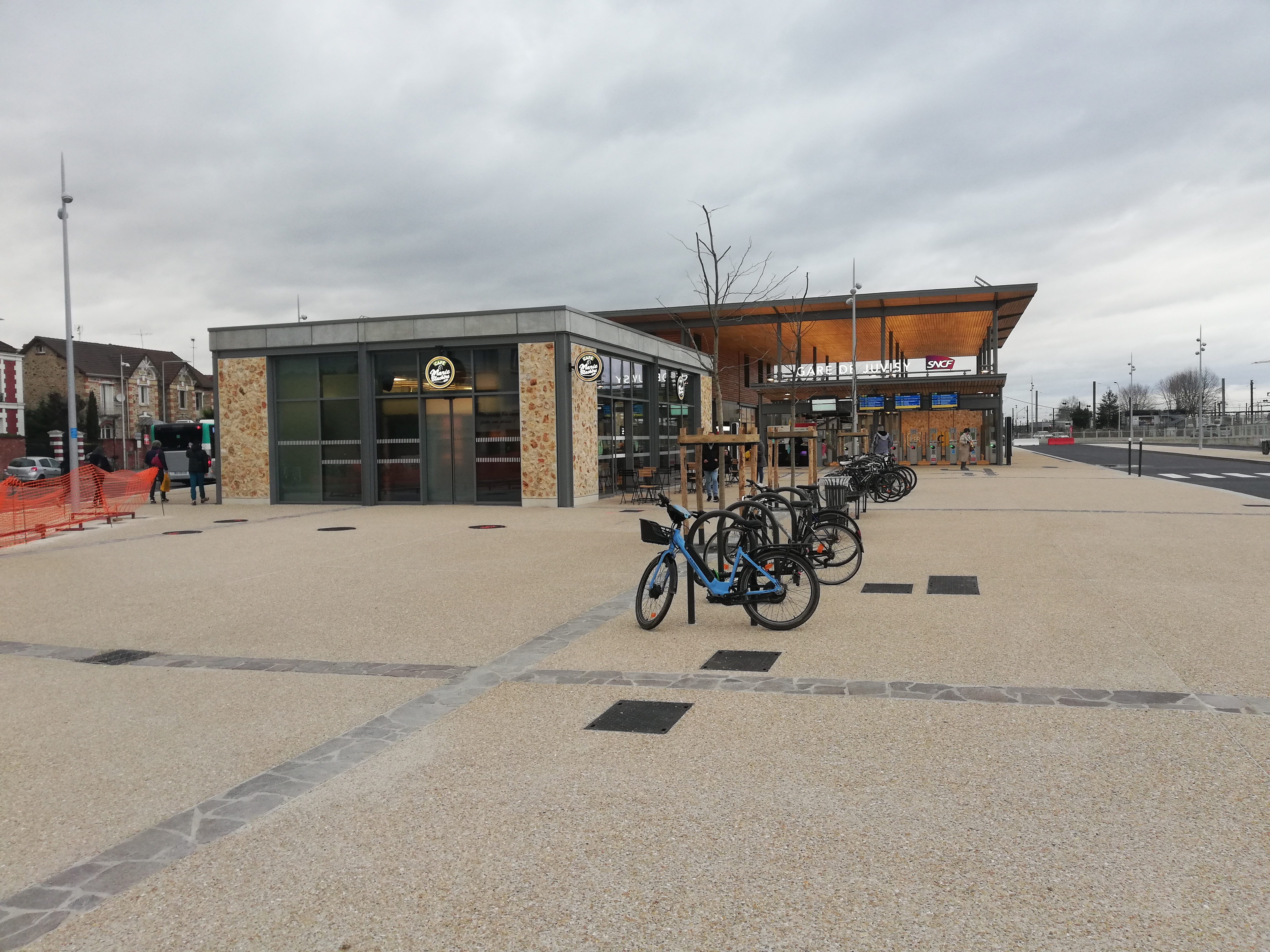 Accès à la gare de Juvisy, en 2020.